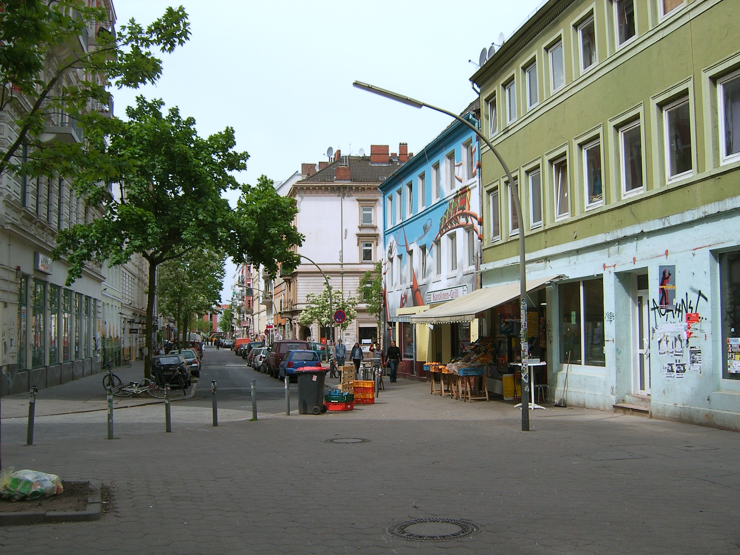 Die Marktstraße ist die Hauptstraße des Karolinenviertels auf St. Pauli.